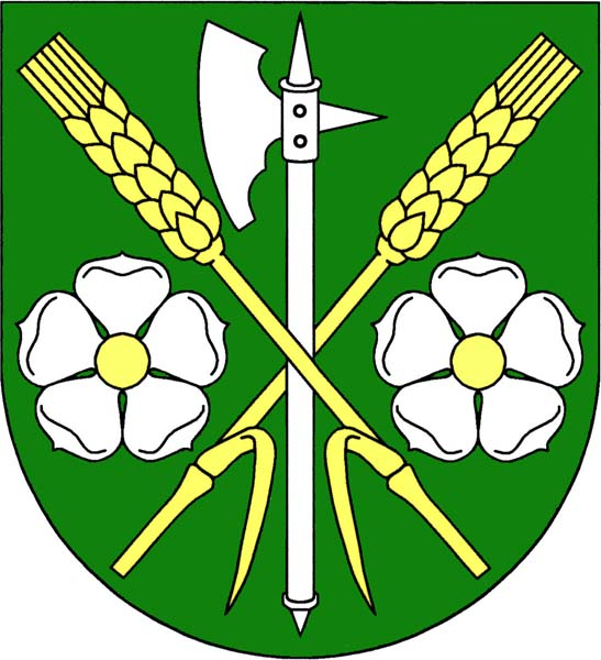 Znak obce Křešice